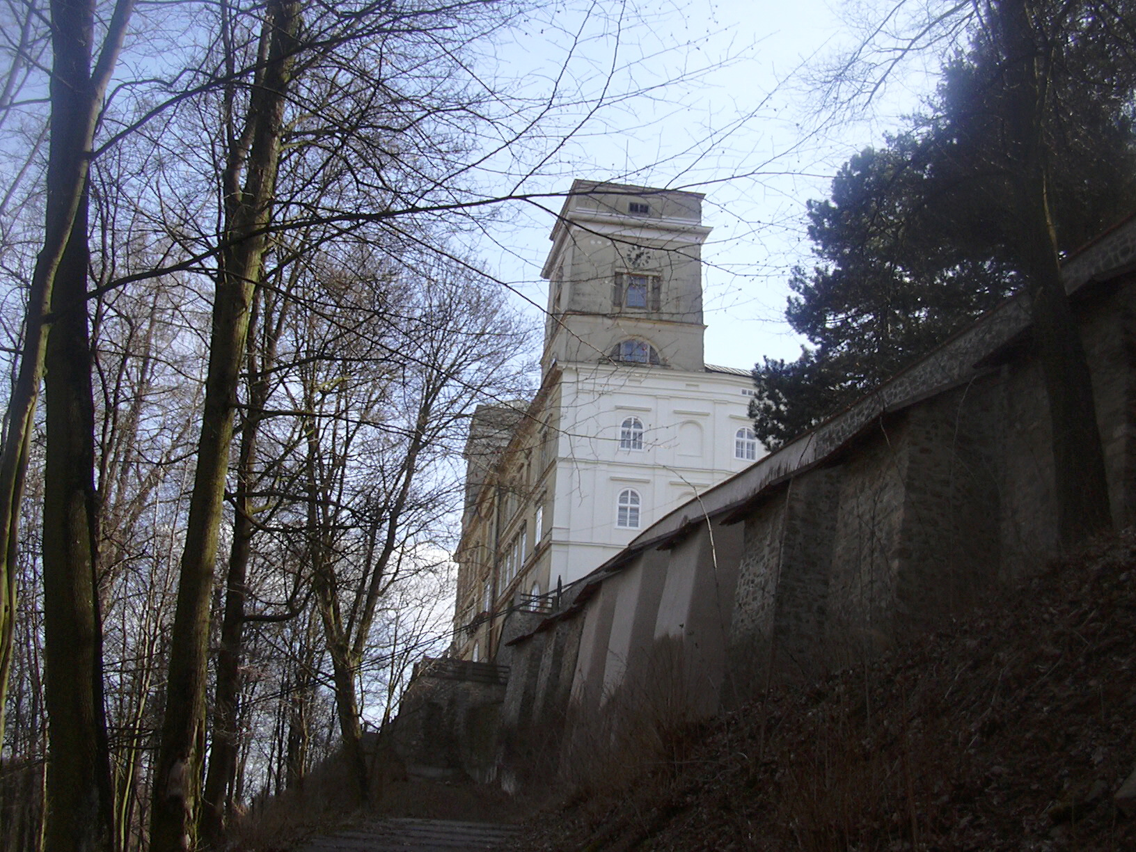 zámek Račice (Vyškov District, Czech Republic)